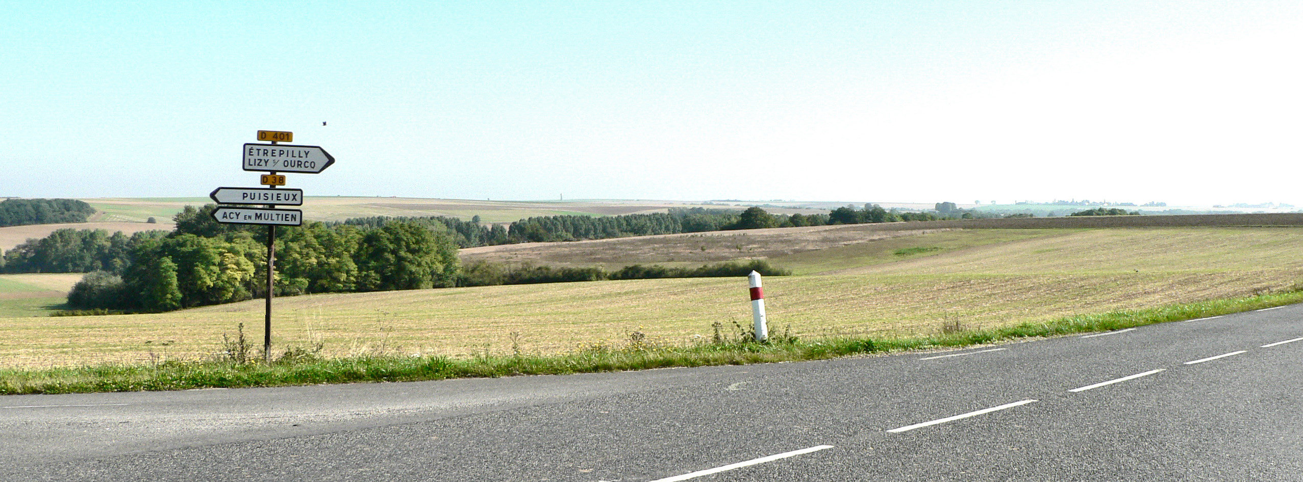 Paysage caractéristique du Multien : vaste plateau agricole coupé ici par la vallée boisée de la Thérouanne